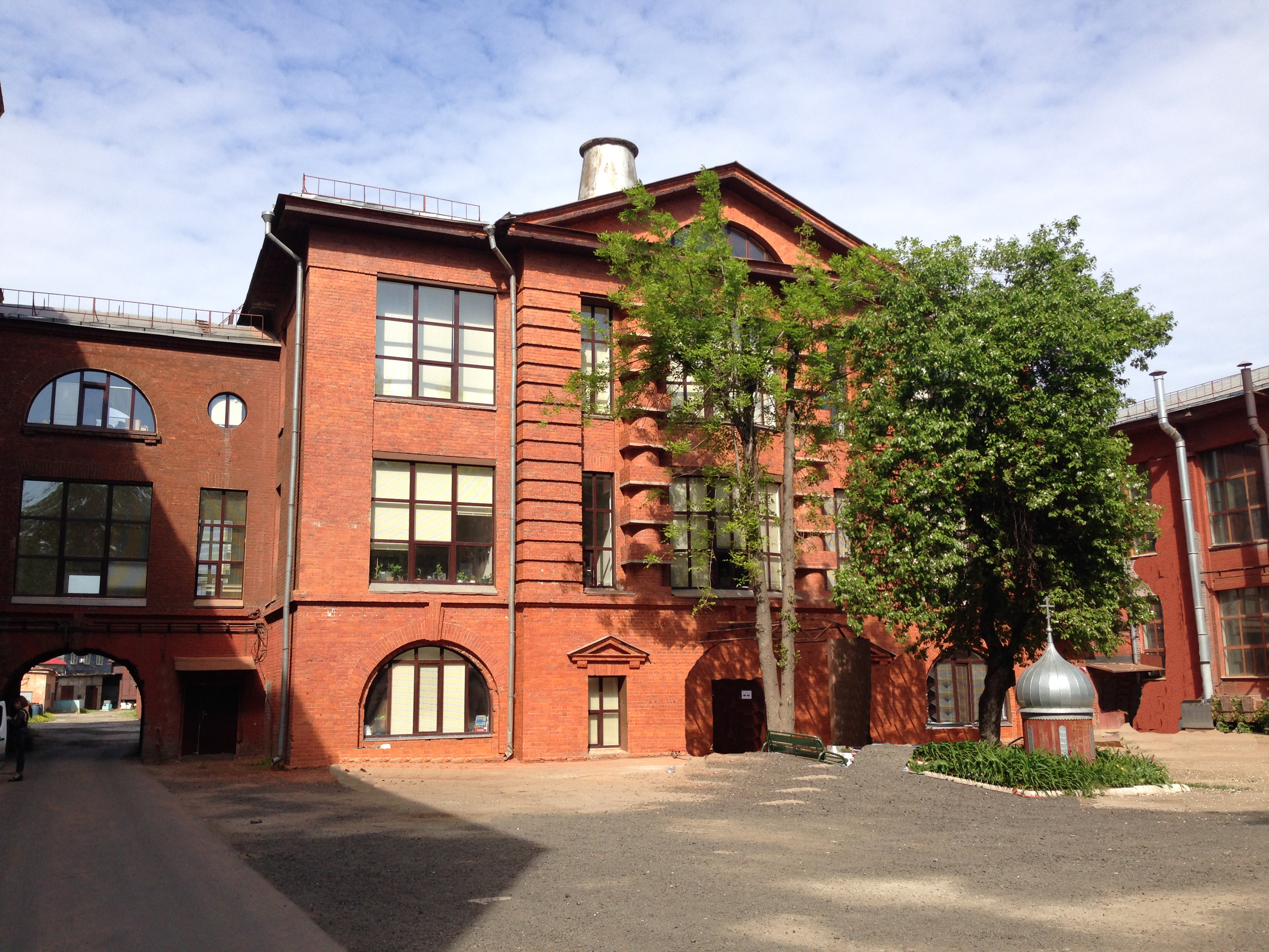 Главный корпус Первого в России протезного завода основанного в 1916 году. Является памятником культурного наследия.